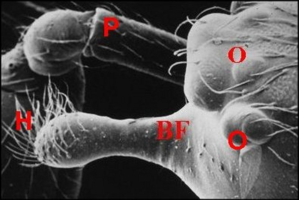 Prosoma d' Argyrodes nasutus. MIcroscope à balayage.